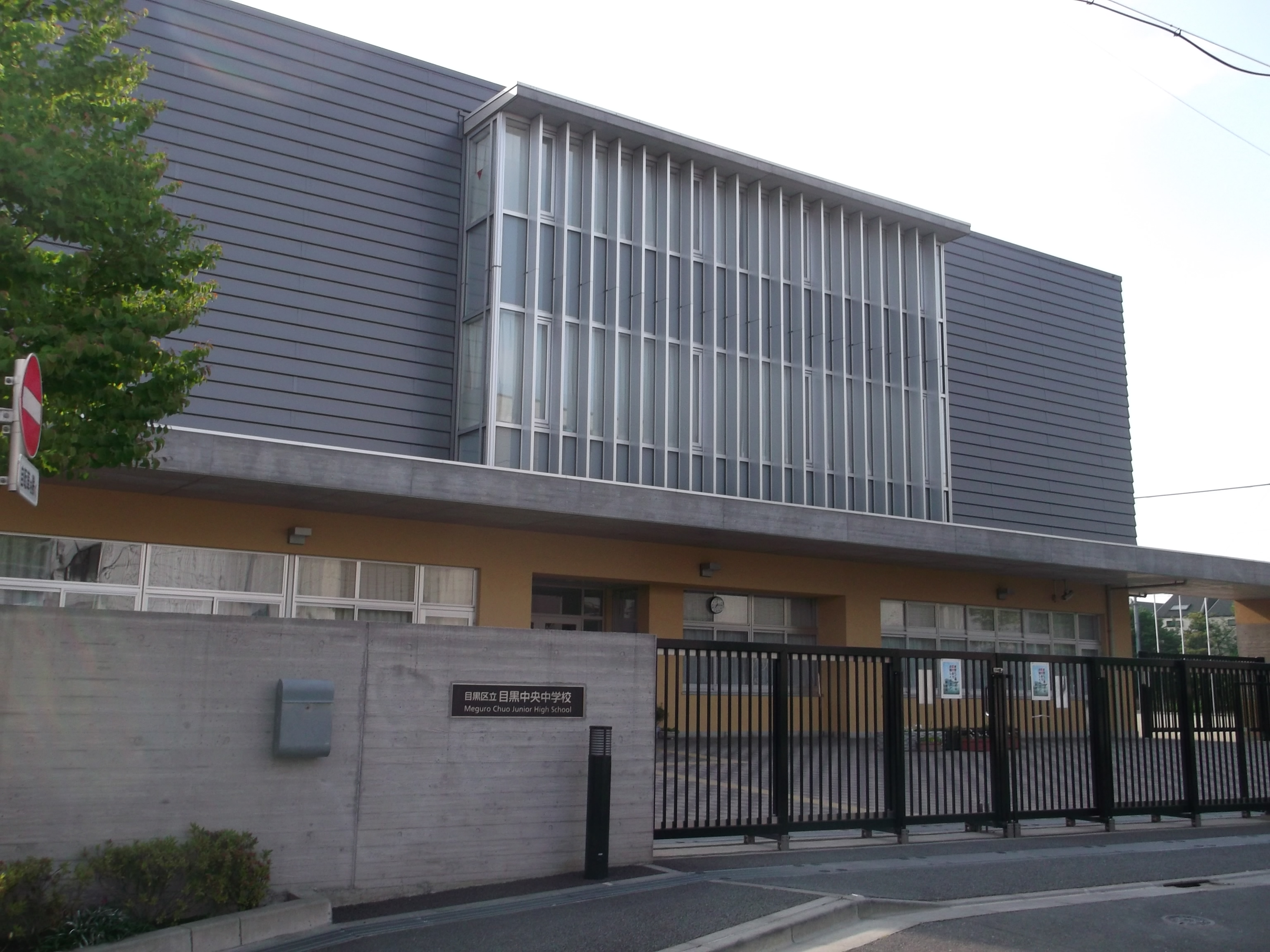 目黒区立目黒中央中学校